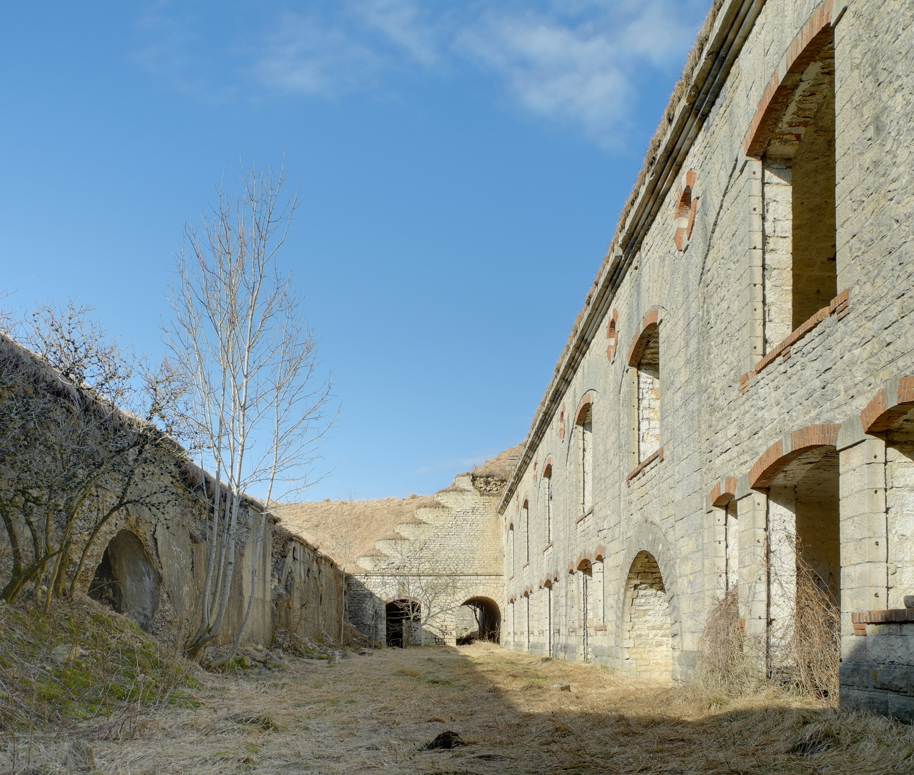 Fort du Lomont : cour intérieure du réduit (HDR).